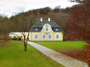 Rathlousdal, herregård ved Odder, Region Midtjylland